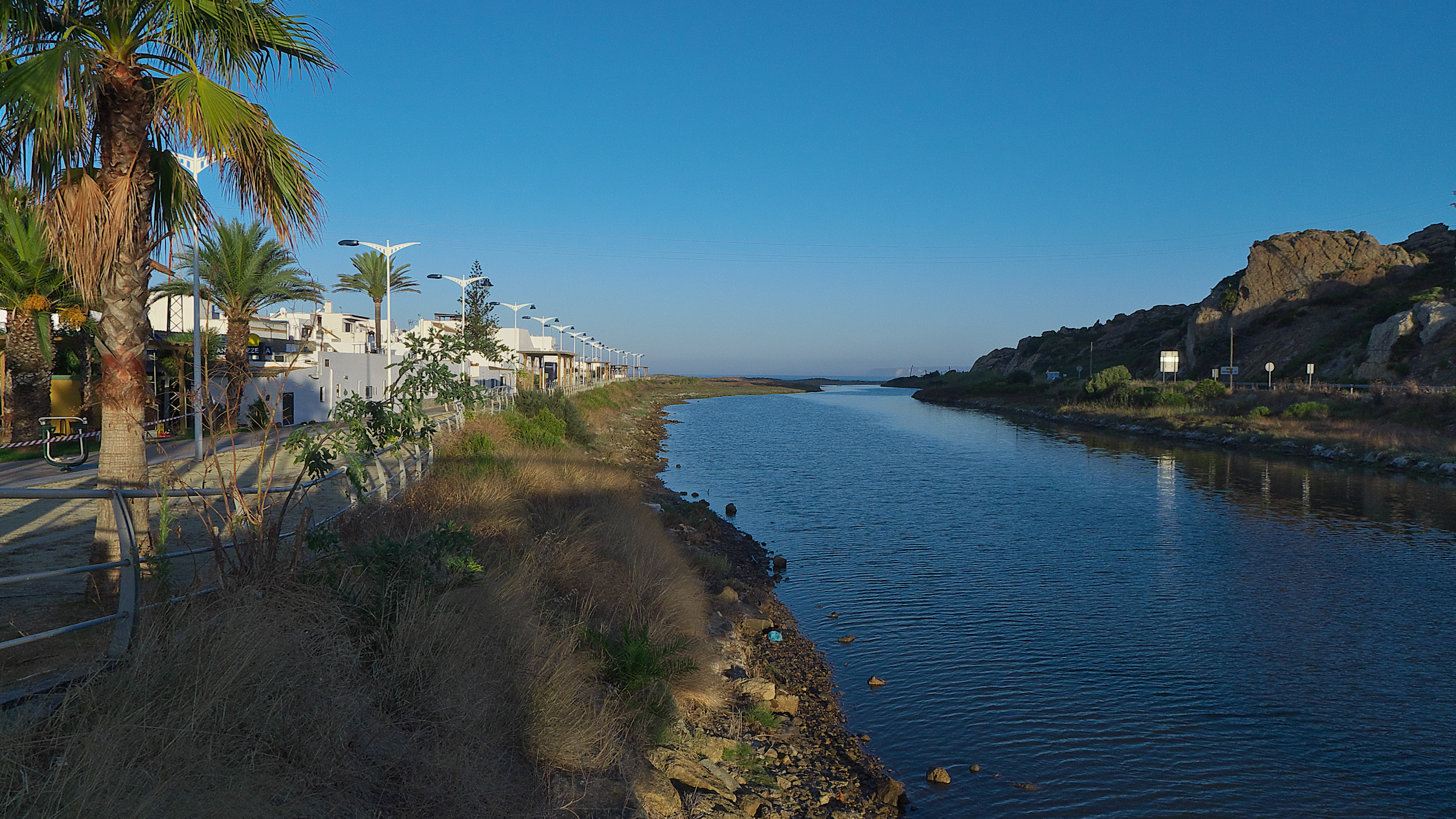 El río Cachón a su paso por Zahara de los Atunes, Cádiz.